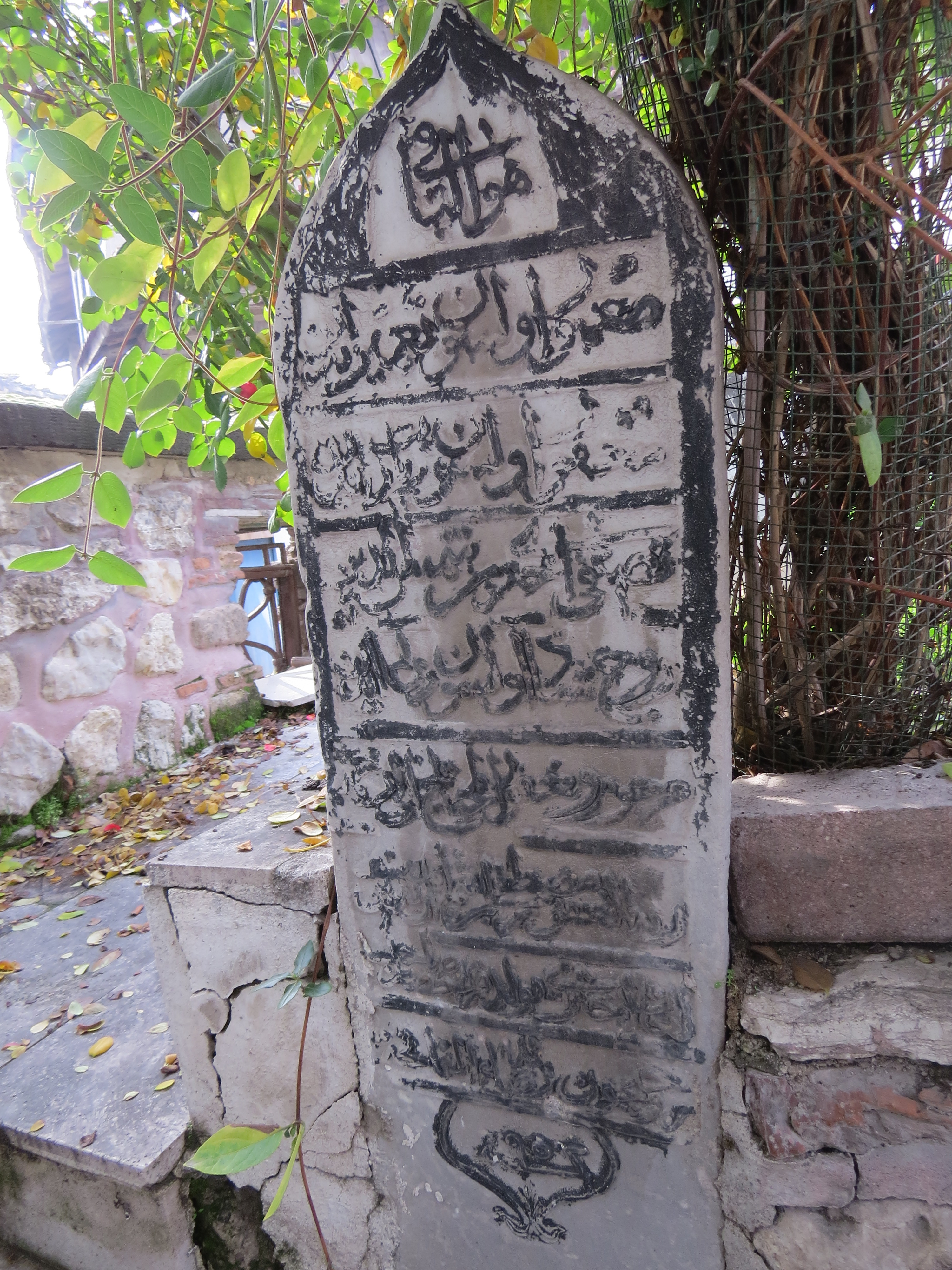 ahterî mustafa kabir taşı